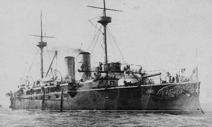 Crucero acorazado Vizcaya alrededor de 1883